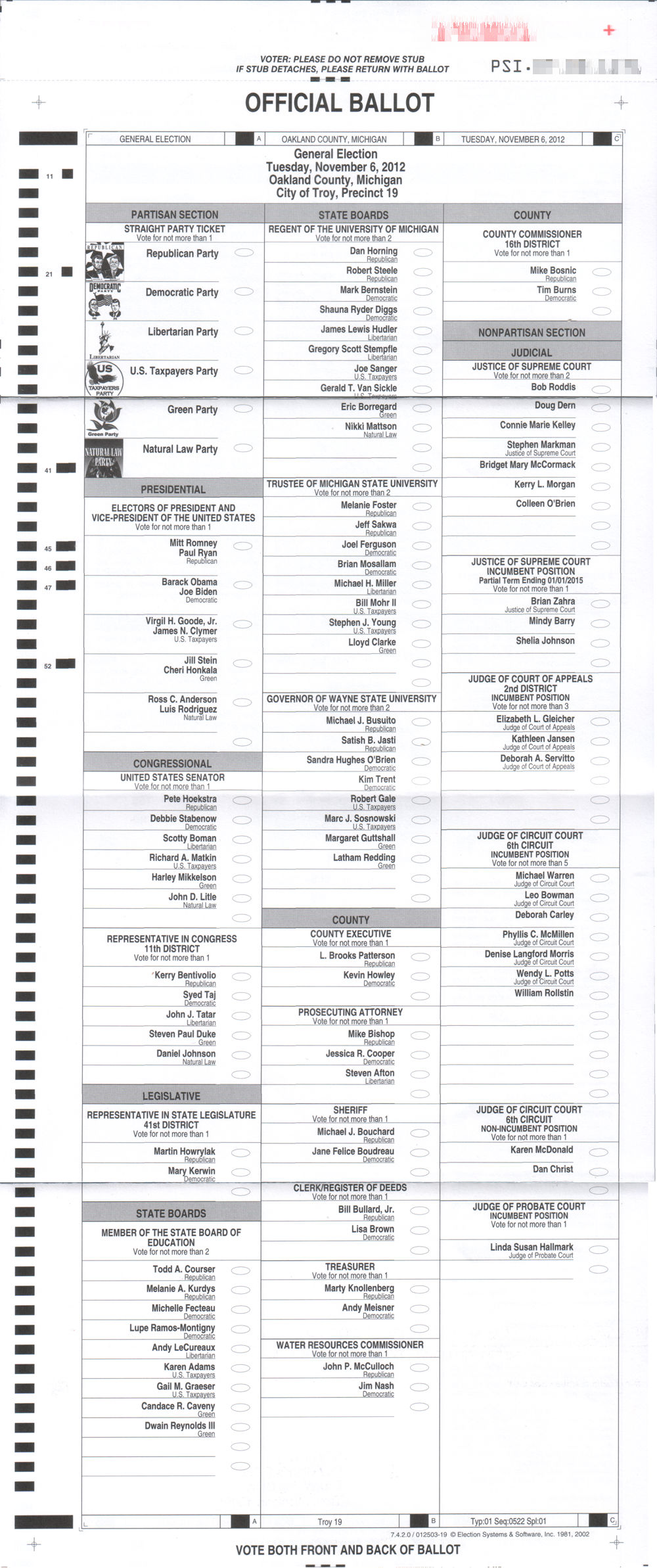 Vorderseite des Stimmzettels zur „General Election 2012“ am 6. November 2012 in Troy (19. Wahlbezirk)